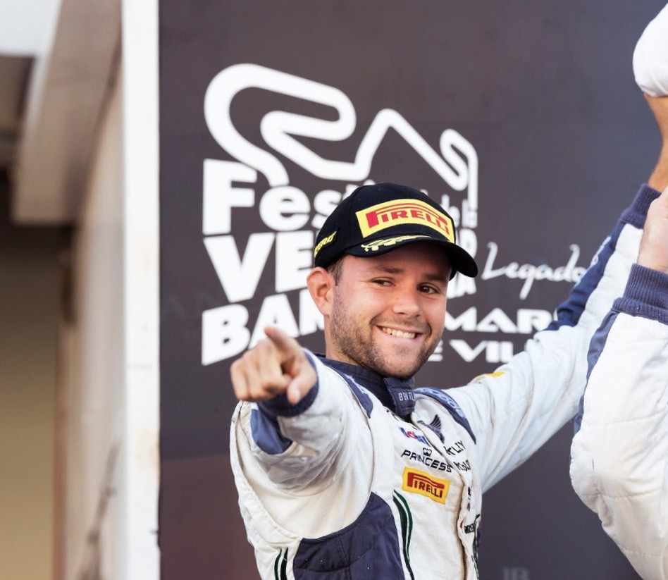 Photographie de Jules Gounon célébrant son podium aux 3 Heures de Barcelone en 2019.